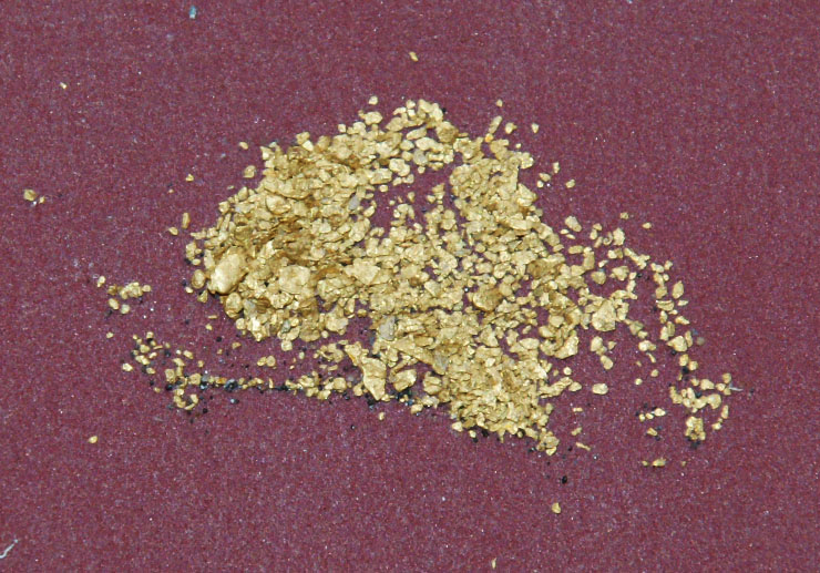 Goldflitter aus der Grossen Fontannen (0.41Gramm). Gewaschen am 14. März 2006